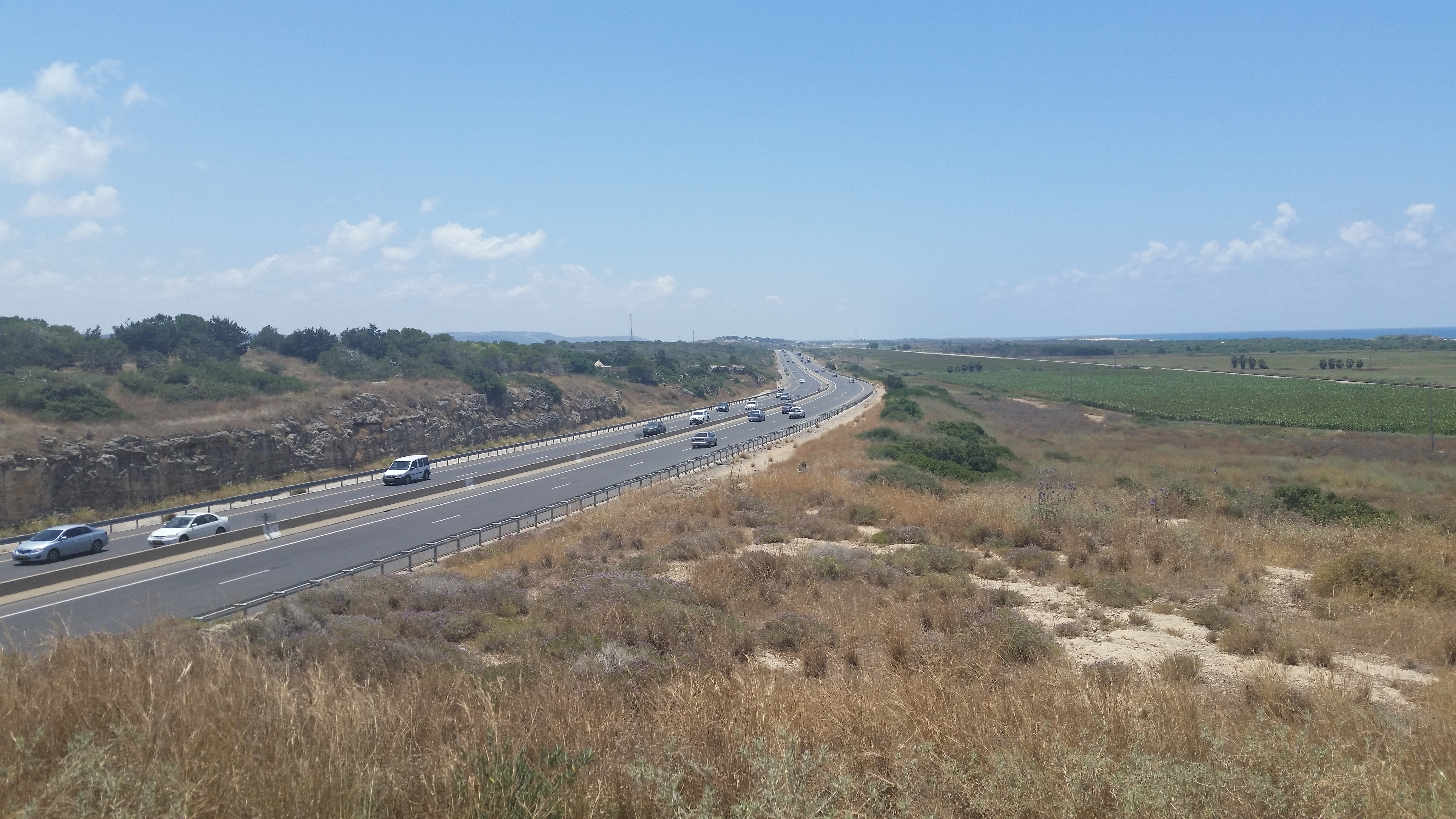 האזור בו שכן בעבר הכפר הארמני שייח' בוריק ליד כביש 2. בתמונה מימין קצה כיפת קבר השייח'